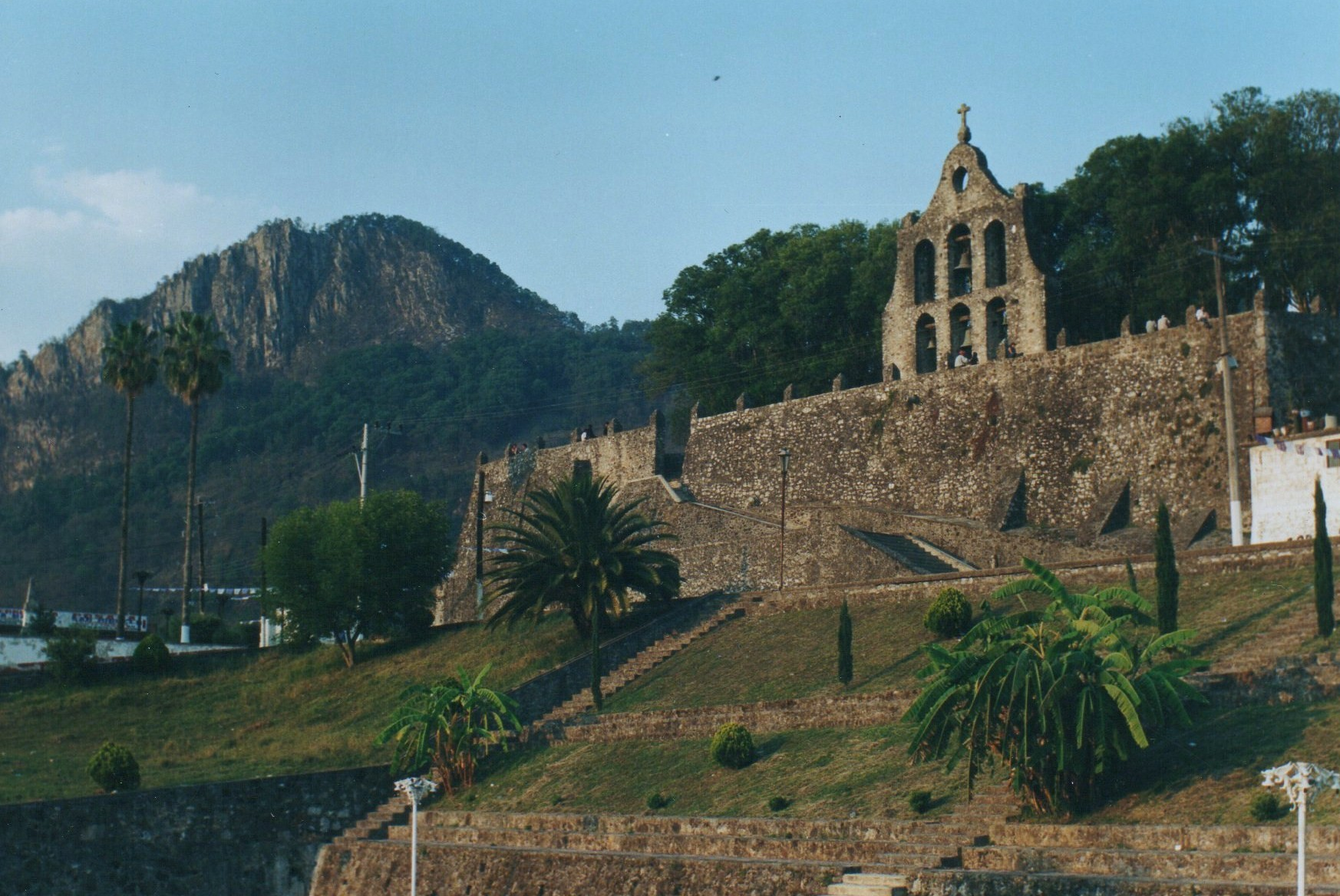 Campanario de Ex-Convento de Nuestra Señora de Loreto, Molango, Hidalgo. México. Al fondo se aprecia "Cerro Blanco". El Ex-Convento cuenta con una gran arboleda enmarcada por este Campanario. Fot. Víctor Espinoza.